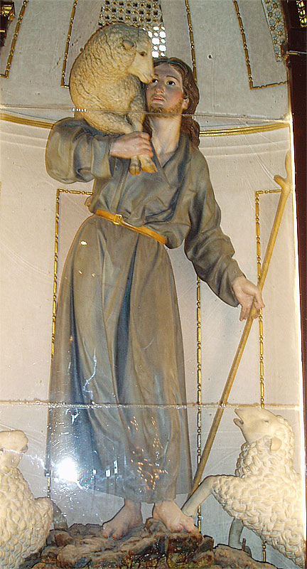 Buen Pastor. Oratorio de la Santa Cueva. Cádiz, España.